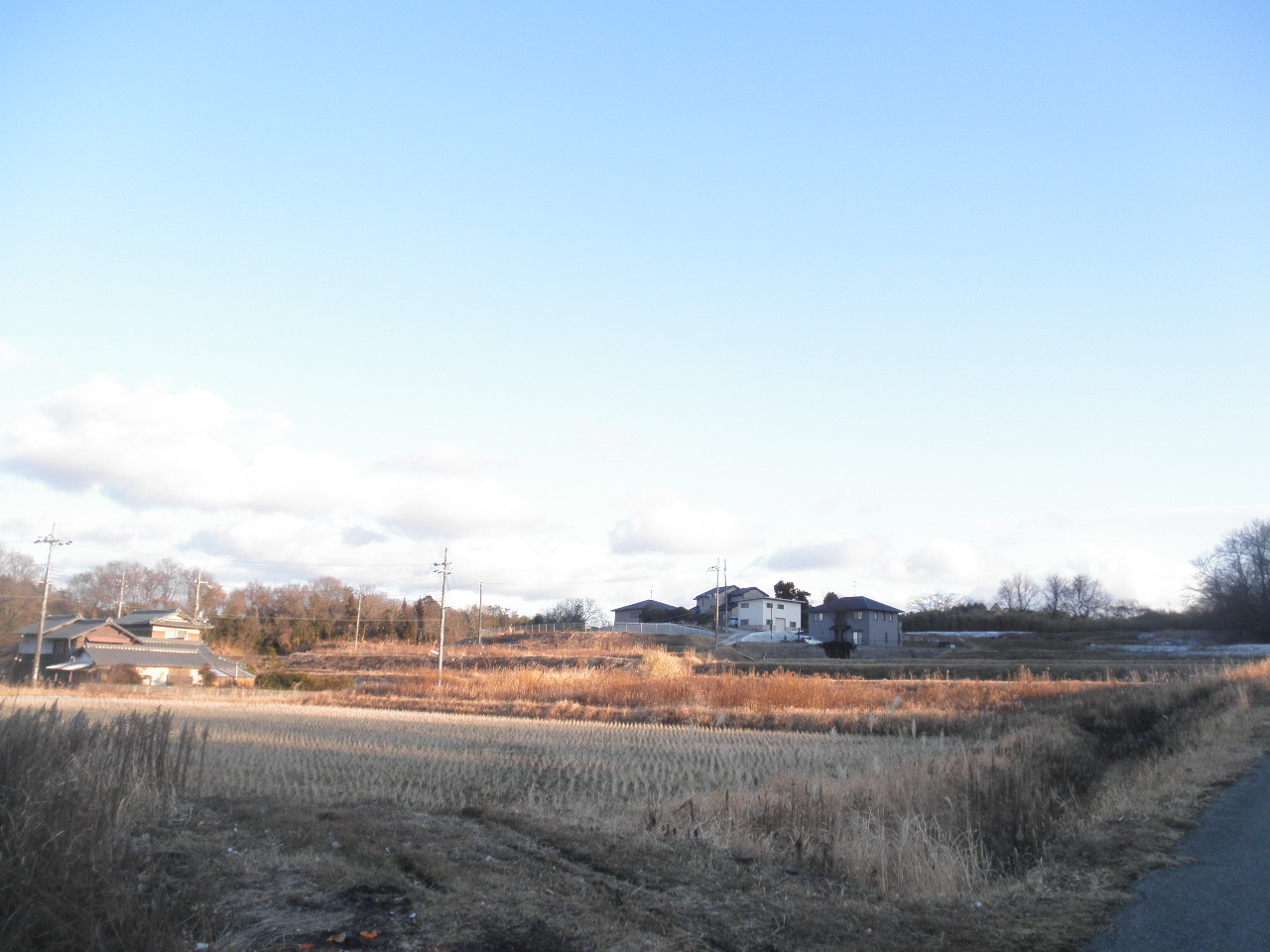 兵庫県神戸市北区大沢町市原